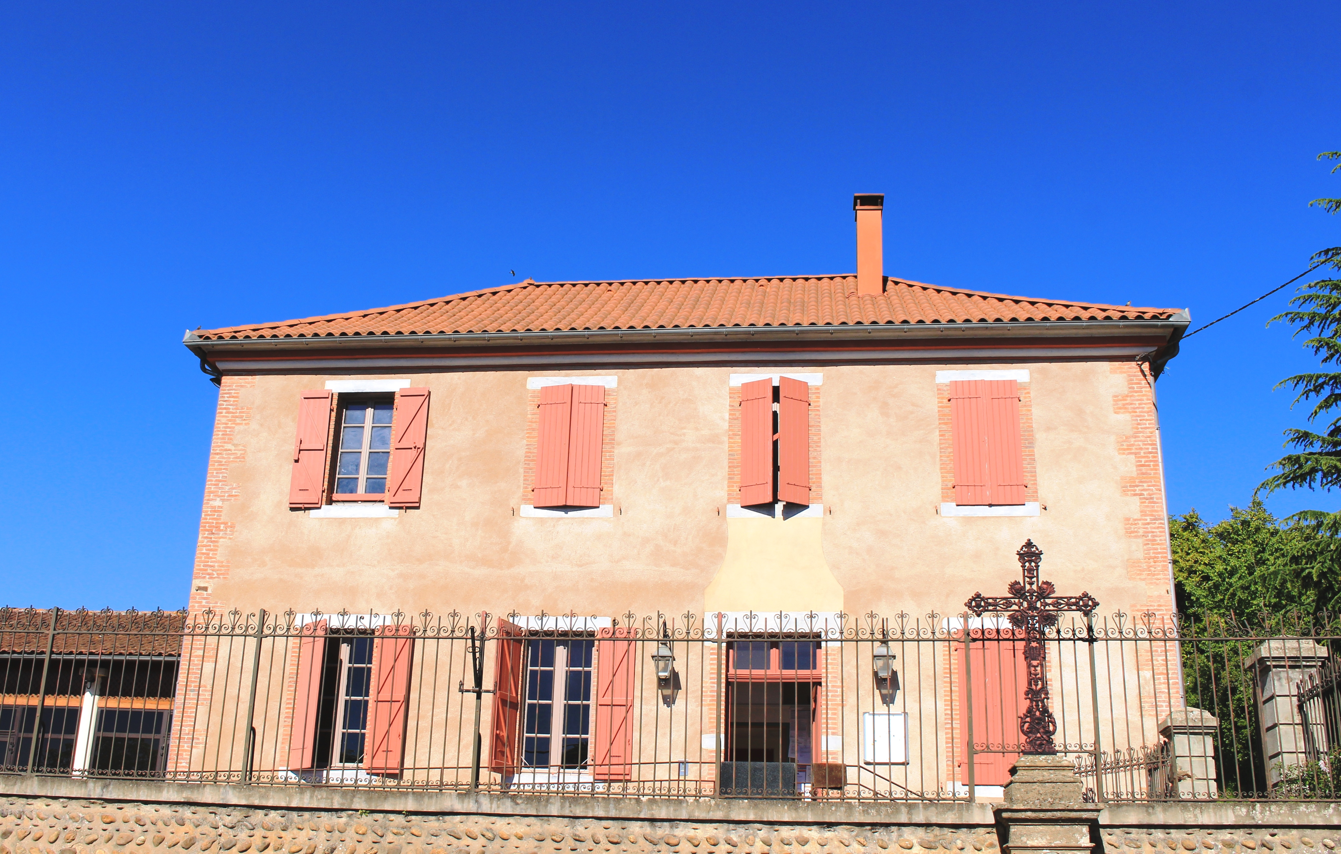 École de Luby-Betmont (Hautes-Pyrénées)